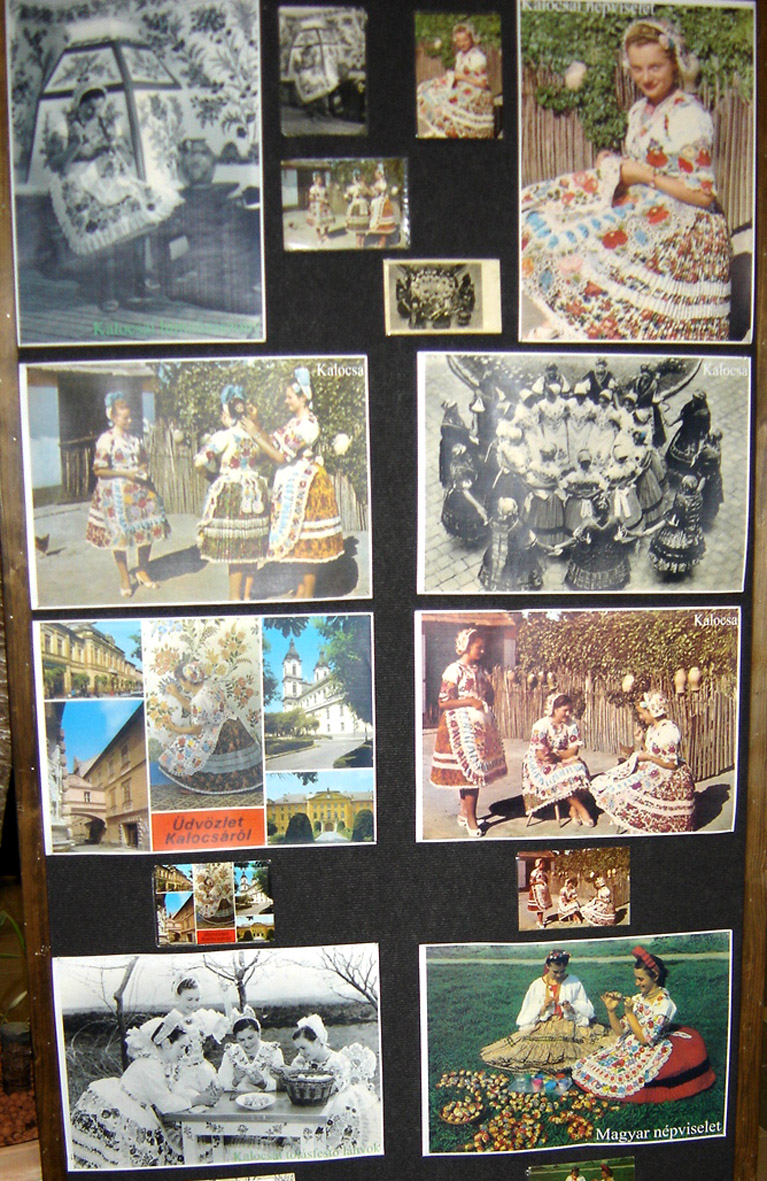 Narodne nošnje na razglednicama, izložba, Beli Manastir, III. 2006.